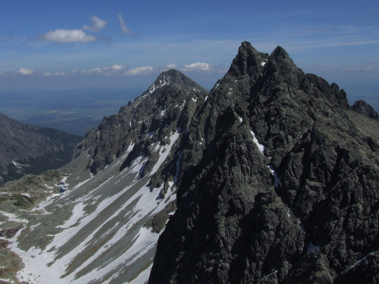 Dolina Staroleśna, Sławkowski Szczyt i Staroleśny Szczyt. Widok z Małej Wysokiej